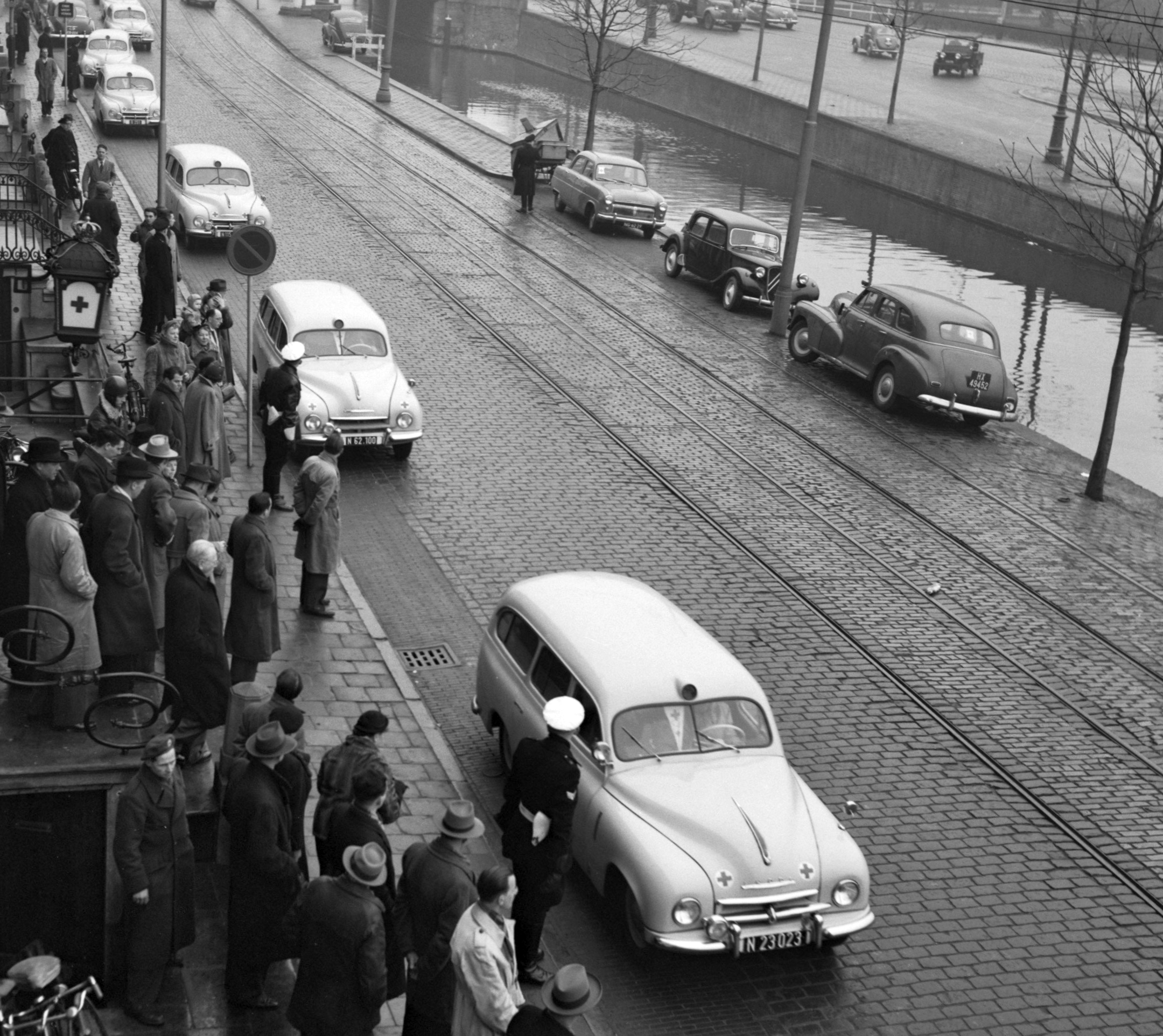 Collectie / Archief : Fotocollectie Anefo Reportage / Serie : [ onbekend ] Beschrijving : Defile afscheid Oostenrijks Rode Kruis Datum : 17 februari 1953 Trefwoorden : AFSCHEID, Defile Fotograaf : Meijer, […] / Anefo Auteursrechthebbende : Nationaal Archief Materiaalsoort : Negatief (zwart/wit) Nummer archiefinventaris : bekijk toegang 2.24.01.04 Bestanddeelnummer : 905-5535